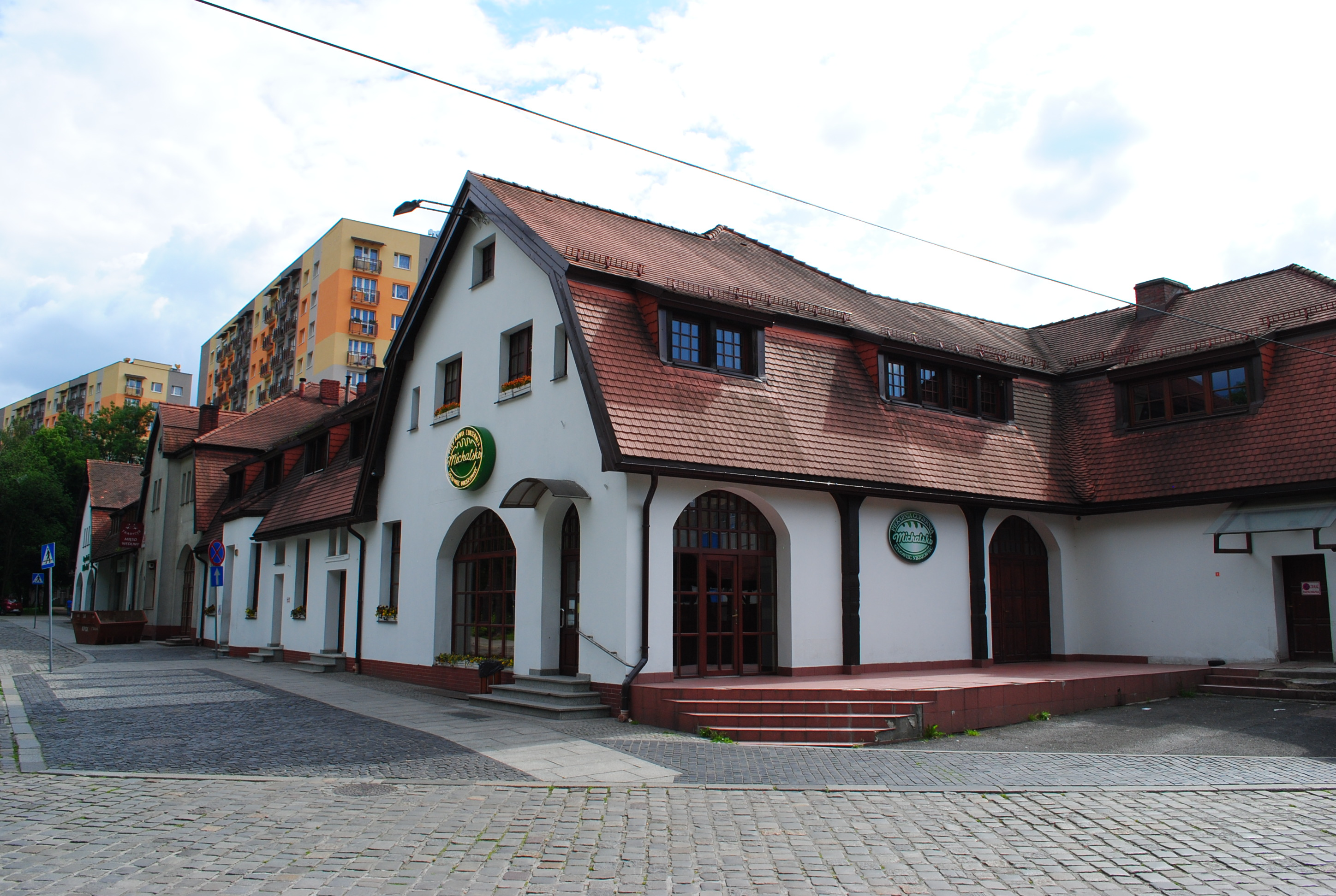 Katowice - Giszowiec. Plac Pod Lipami 7-10